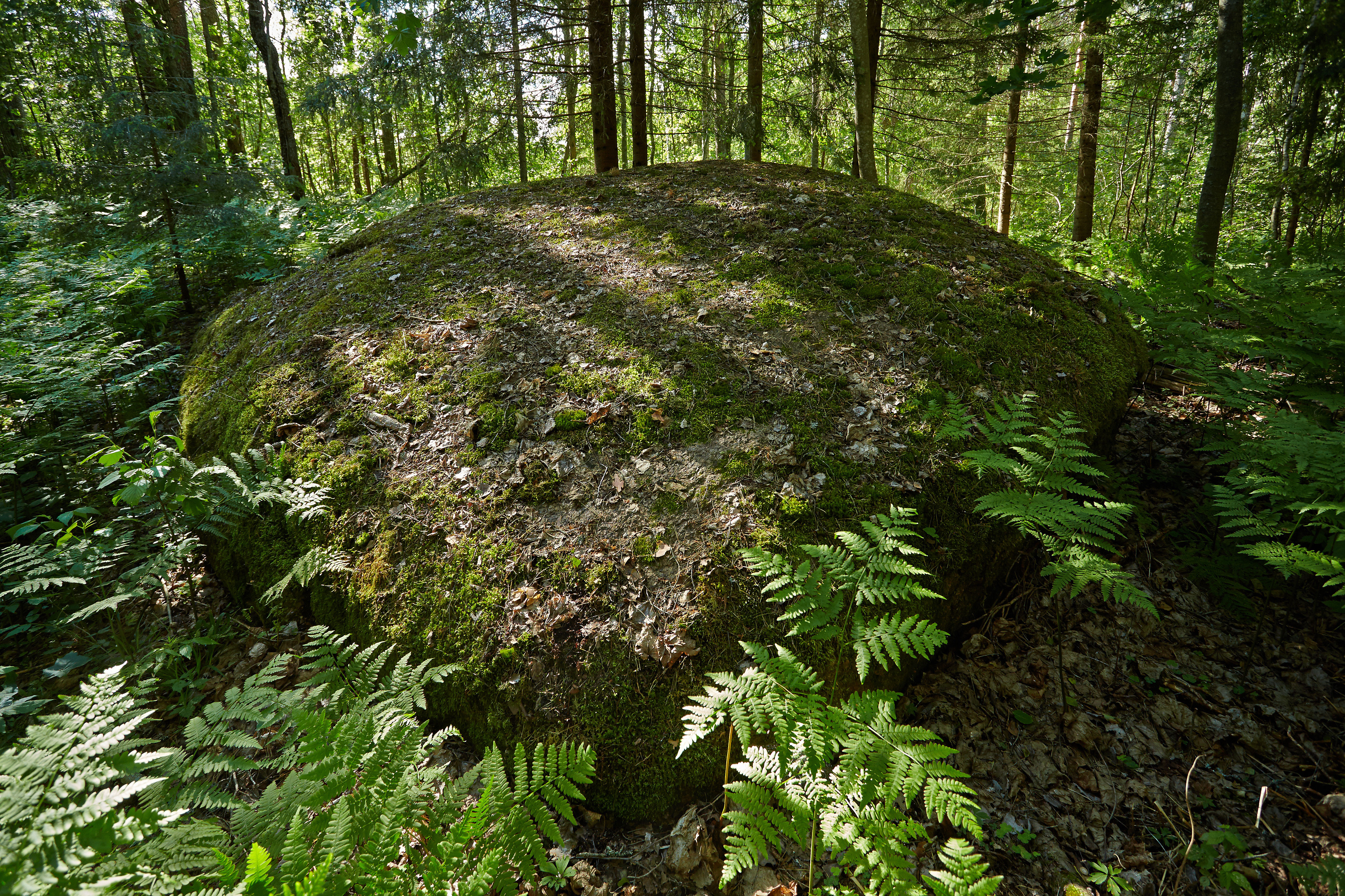 Hinnimäe rändrahn